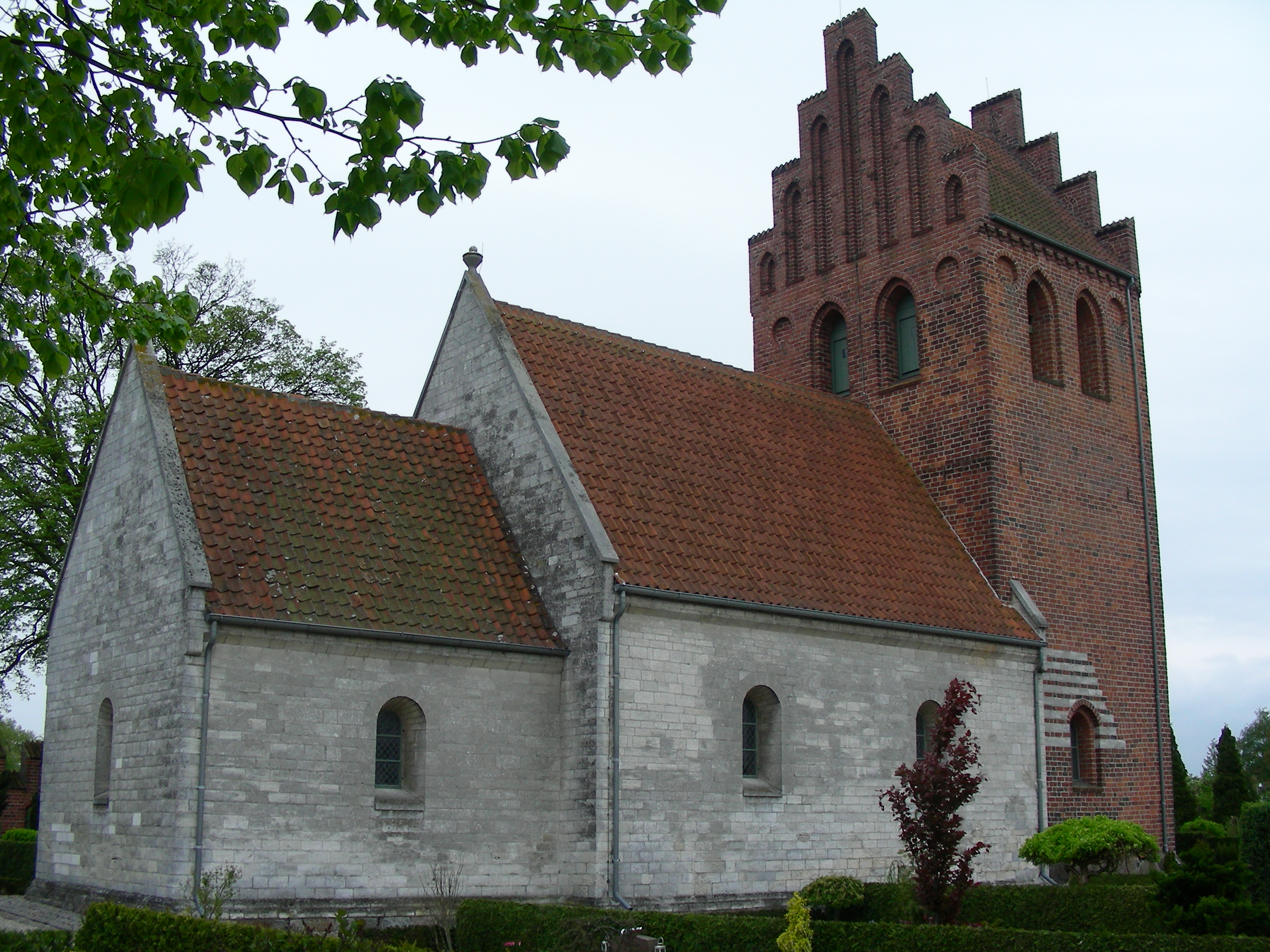 Ishøj kirke, Ishøj, Denmark